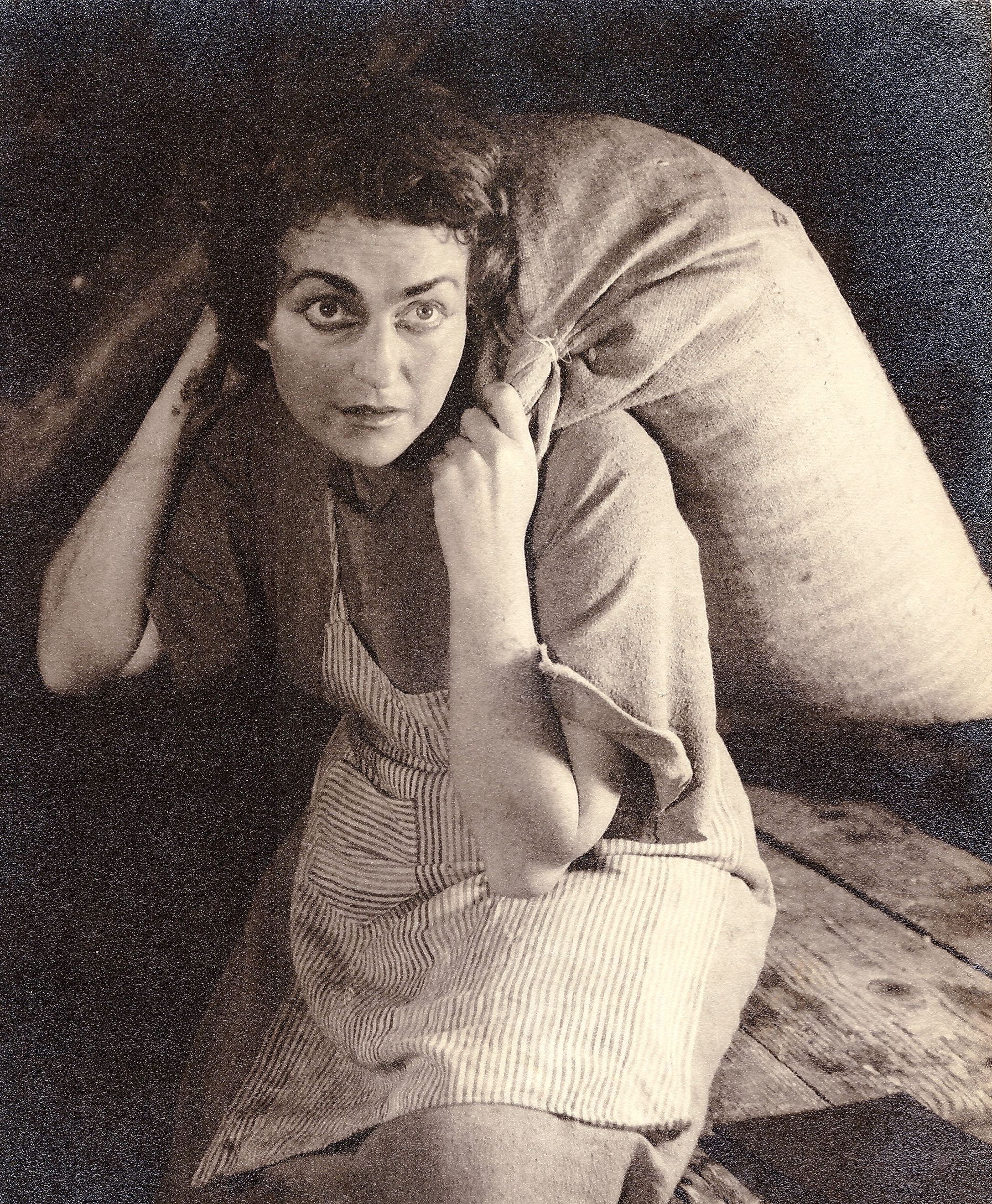 בתפקיד בלינדה מק-דונלד בהצגה "ג'וני בלינדה"